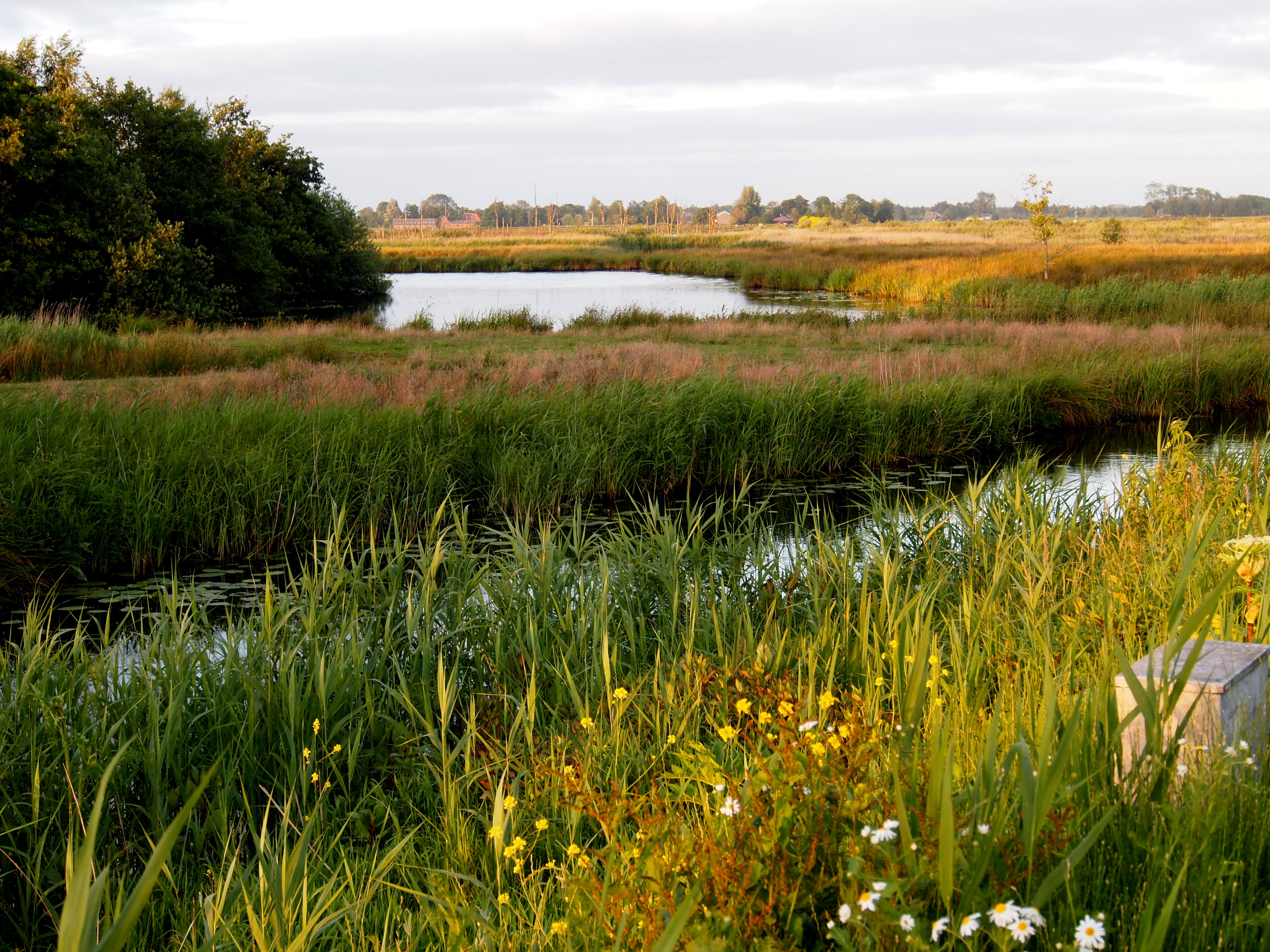 Het avondzonnetje over de Alde Feanen This is a photo or sound file made in De Alde Feanen National Park in the Netherlands, with the main subject of the file in the category: landscapes